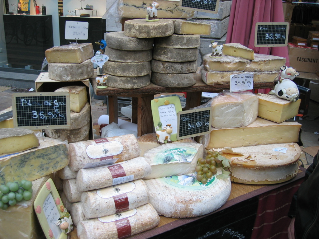 Fromages sur un marché